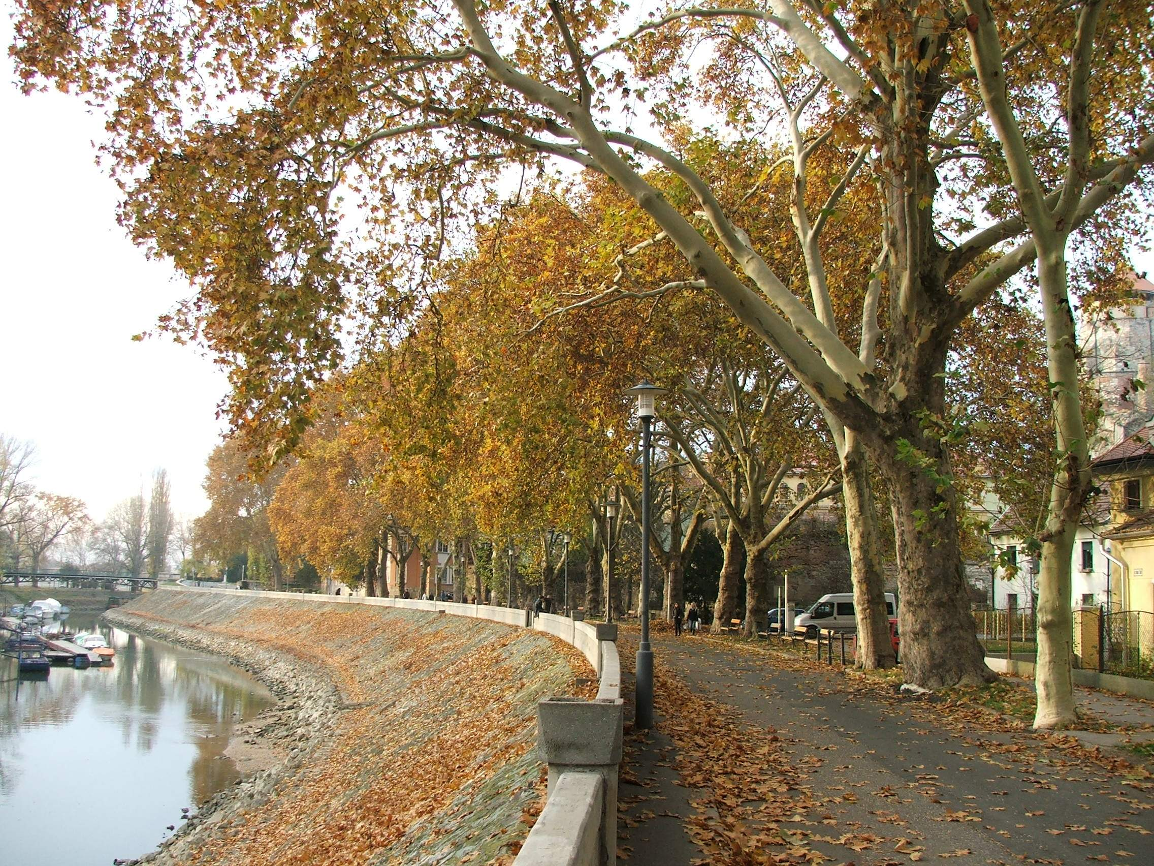 Kis-Duna, Esztergom